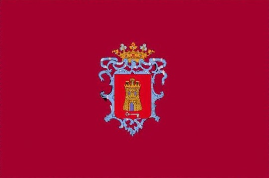 Bandera de la Muy Noble y Muy Leal Ciudad de Alfaro